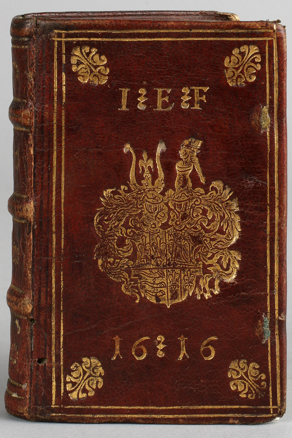 Reliure en maroquin rouge ancien, portant les initiales I.E.F. et la date de 1616, aux armes de la famille Fugger von Kirchberg und zu Weißenhorn. Sujet : Le Théâtre du monde contenant le discours des misères humaines ; dignité de l'homme composé en latin par P. Boaystuau, dit Launnay, natif de Bretagne, à Lyon : par Benoist Rigaul, 1568. Notes : La reliure pourrait être plus ancienne que le décor des armes (des Fugger von Kirchberg und zu Weißenhorn). Bibliothèque-médiathèque de Nancy, Rés. 10 261. Plus de détails sur